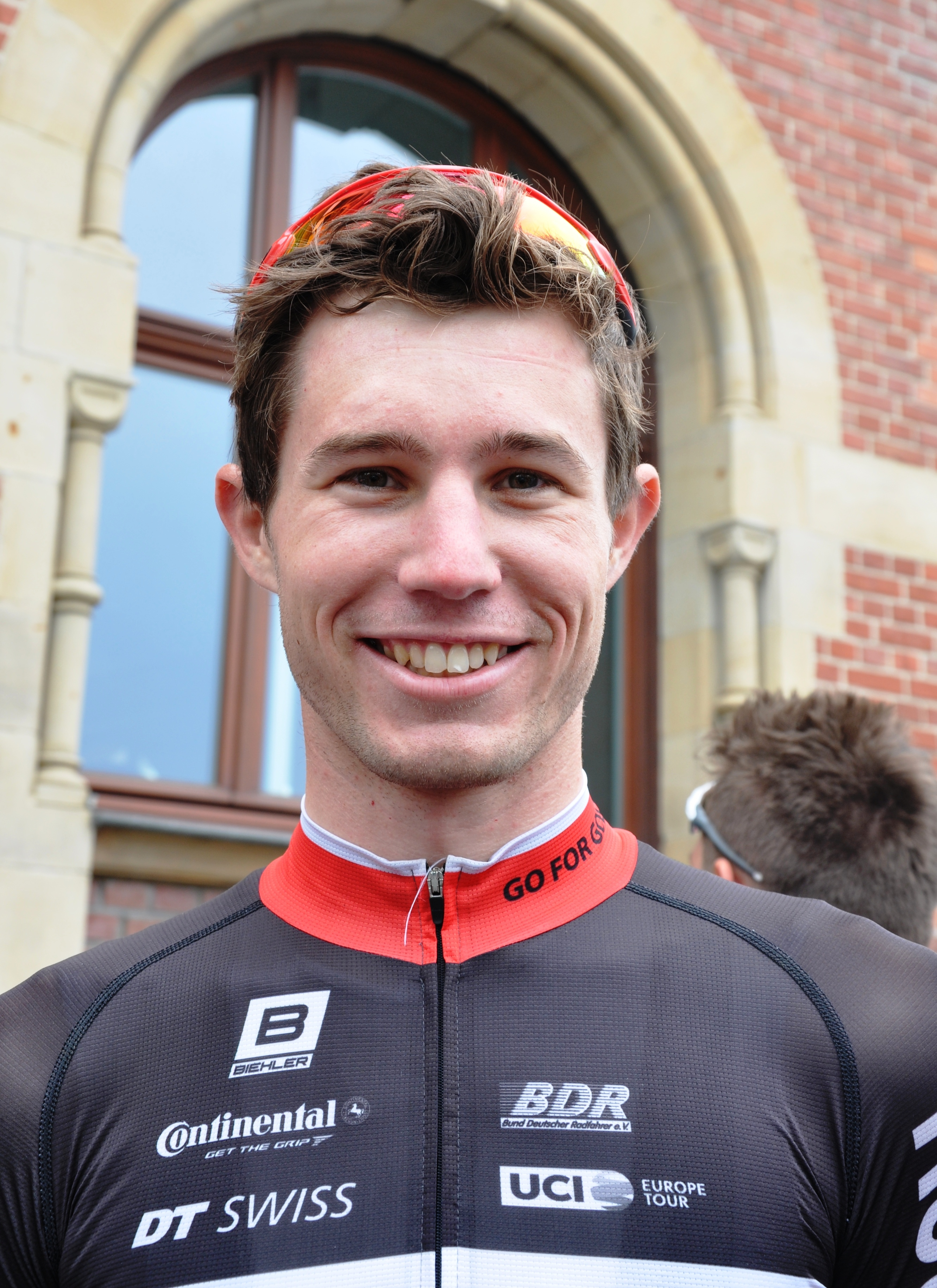 Mario Vogt, deutscher Radrennfahrer